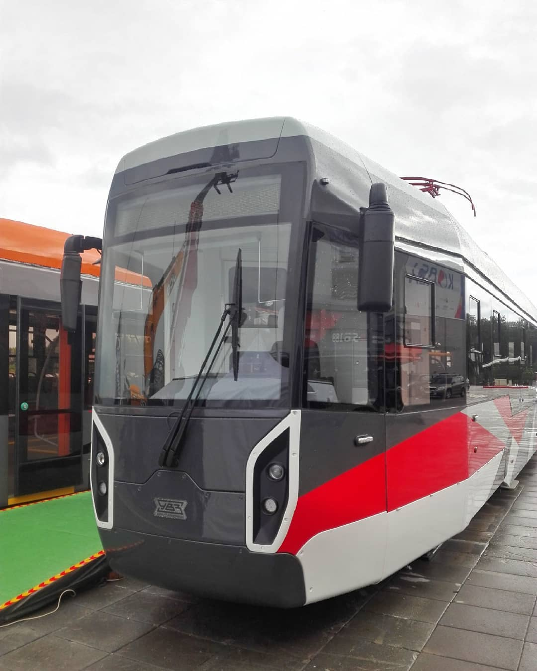 Трамвайный вагон модели 71-412 на выставке ИННОПРОМ-2018 в Екатеринбурге.